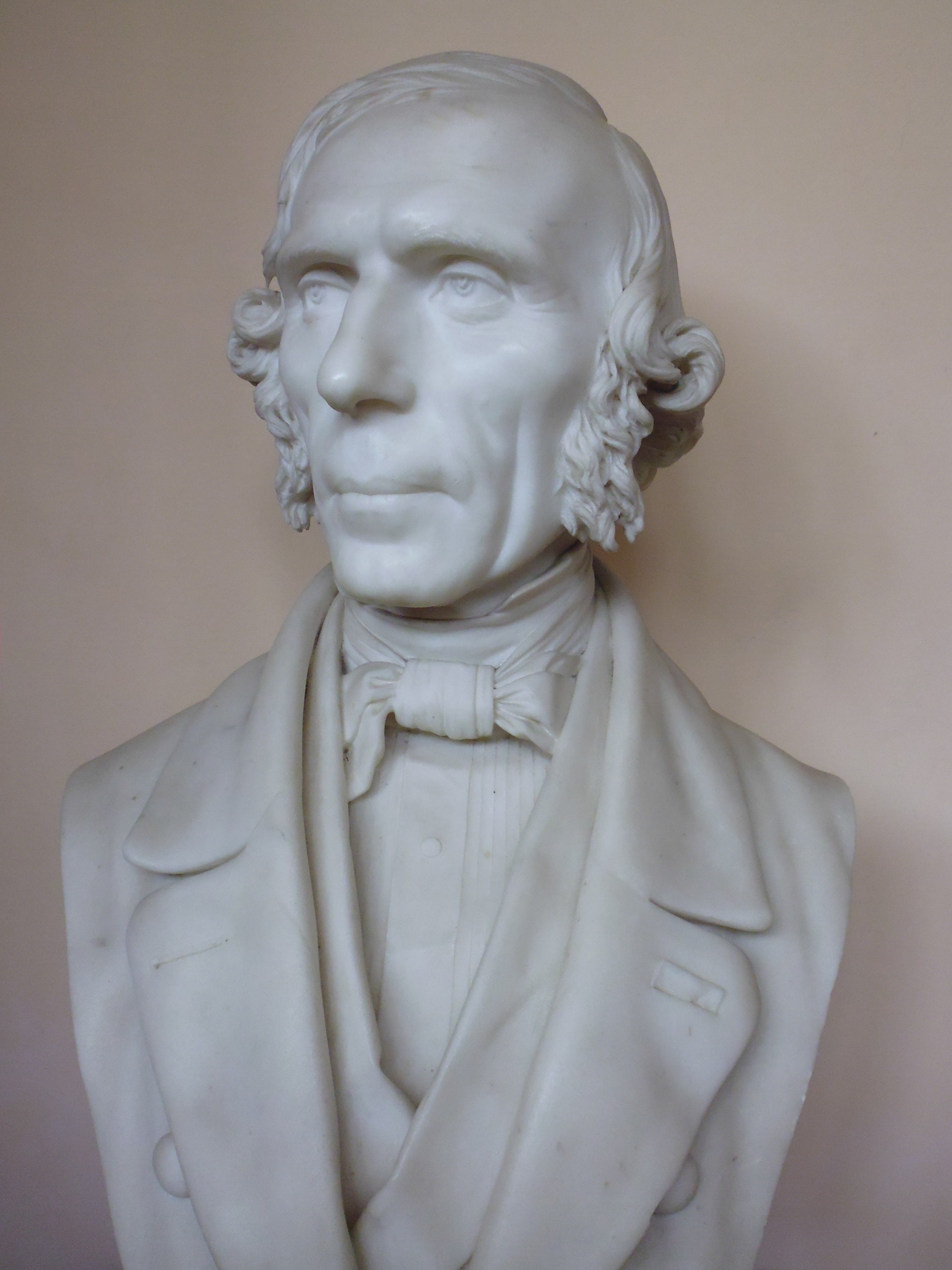 Buste de Honoré Desloye (1802-1886), le père d'Emile Desloye (1836-1892), sculpté par Henri-Frédéric Iselin (vers 1859-1860).